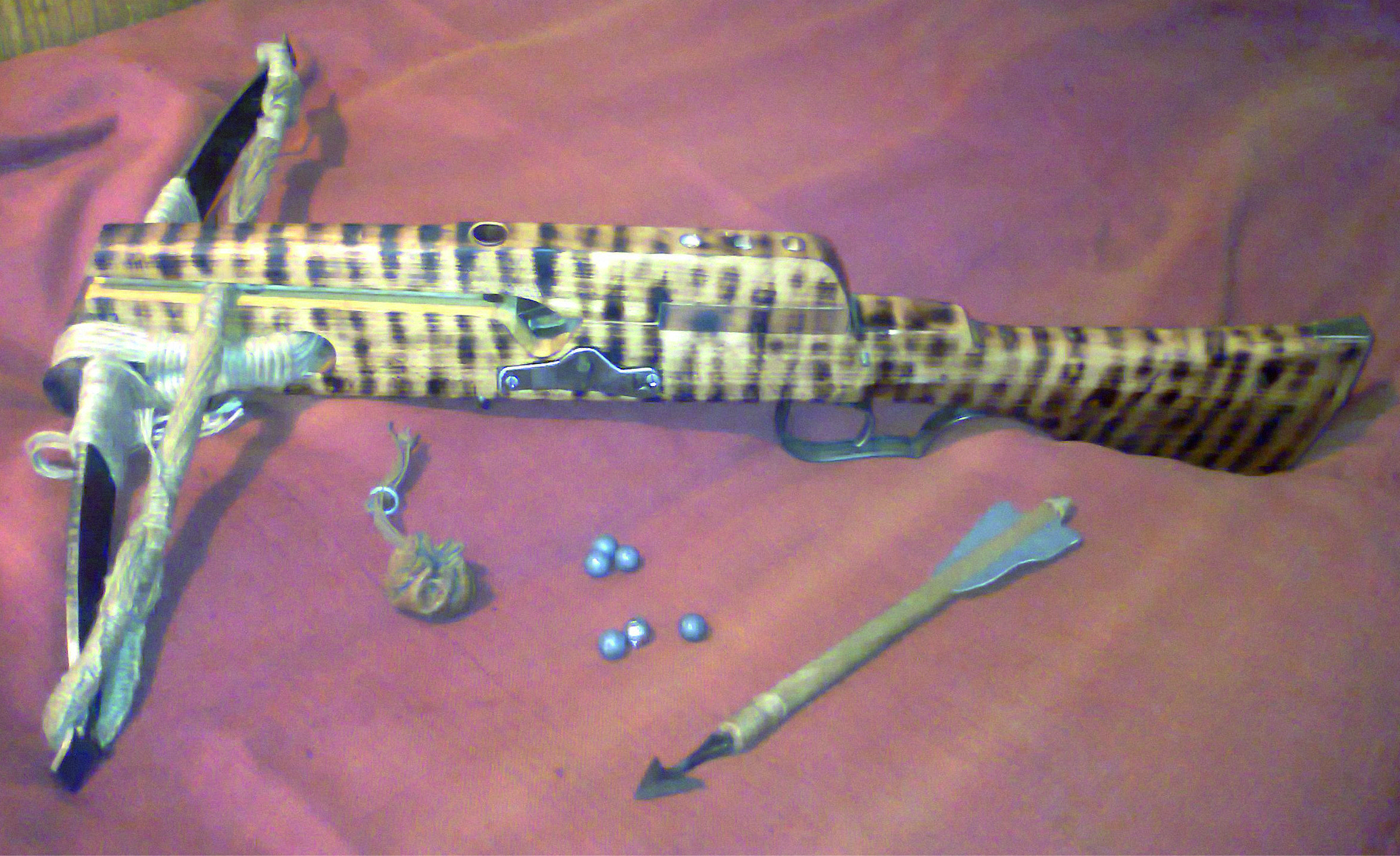 балестер